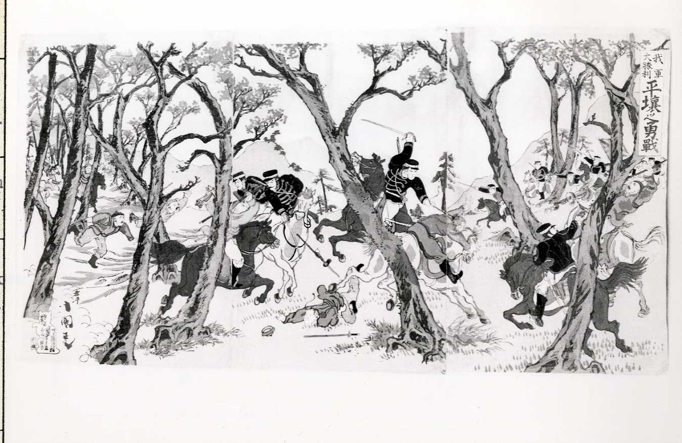 Drzeworyt